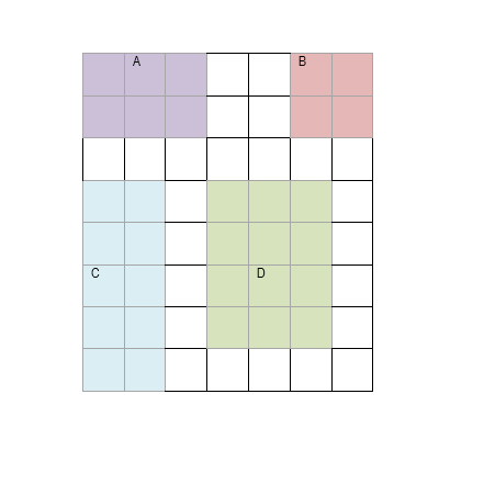 Voorbeeld van oppervlak